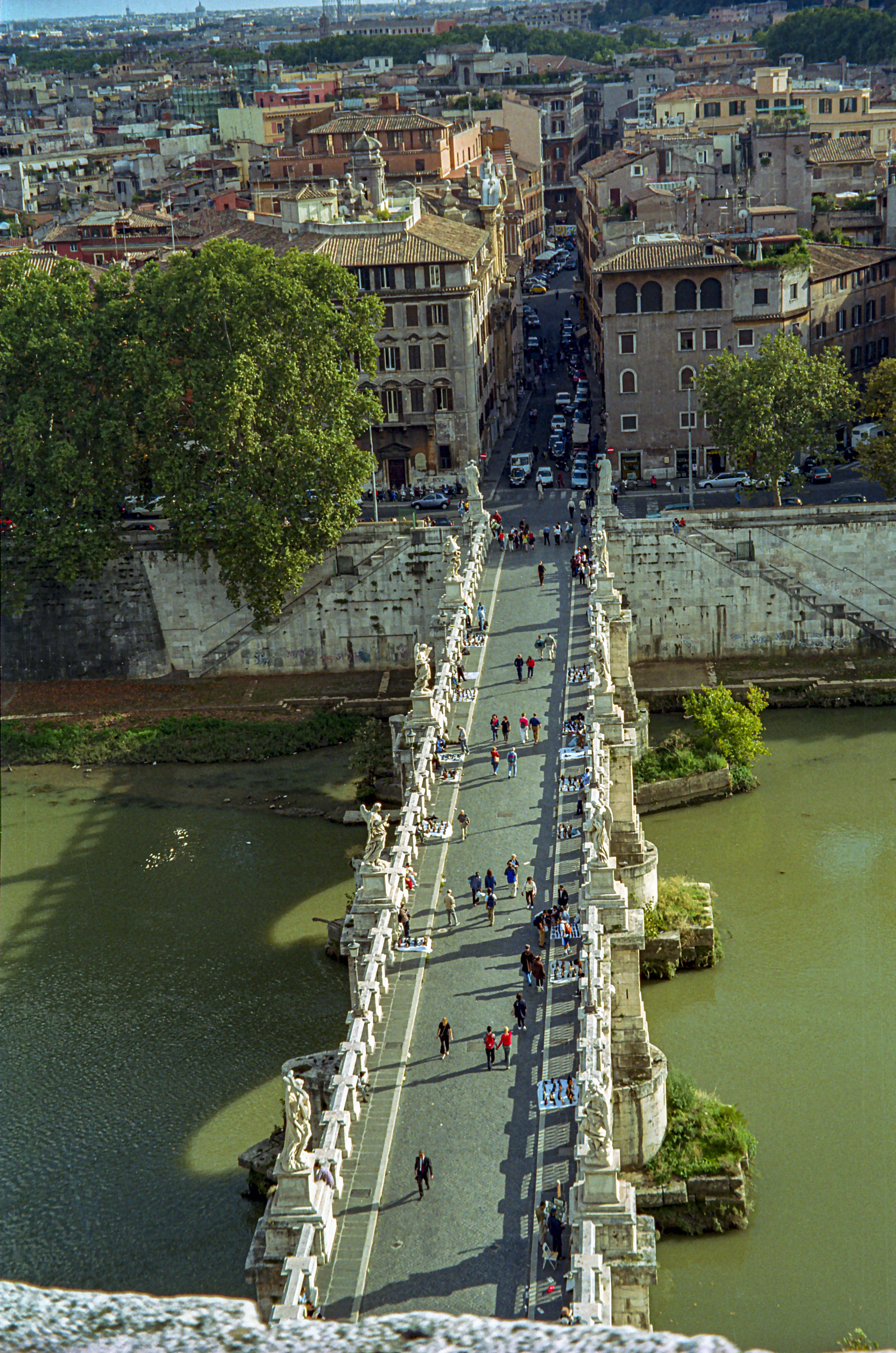 Roma, Ponte Sant'Angelo